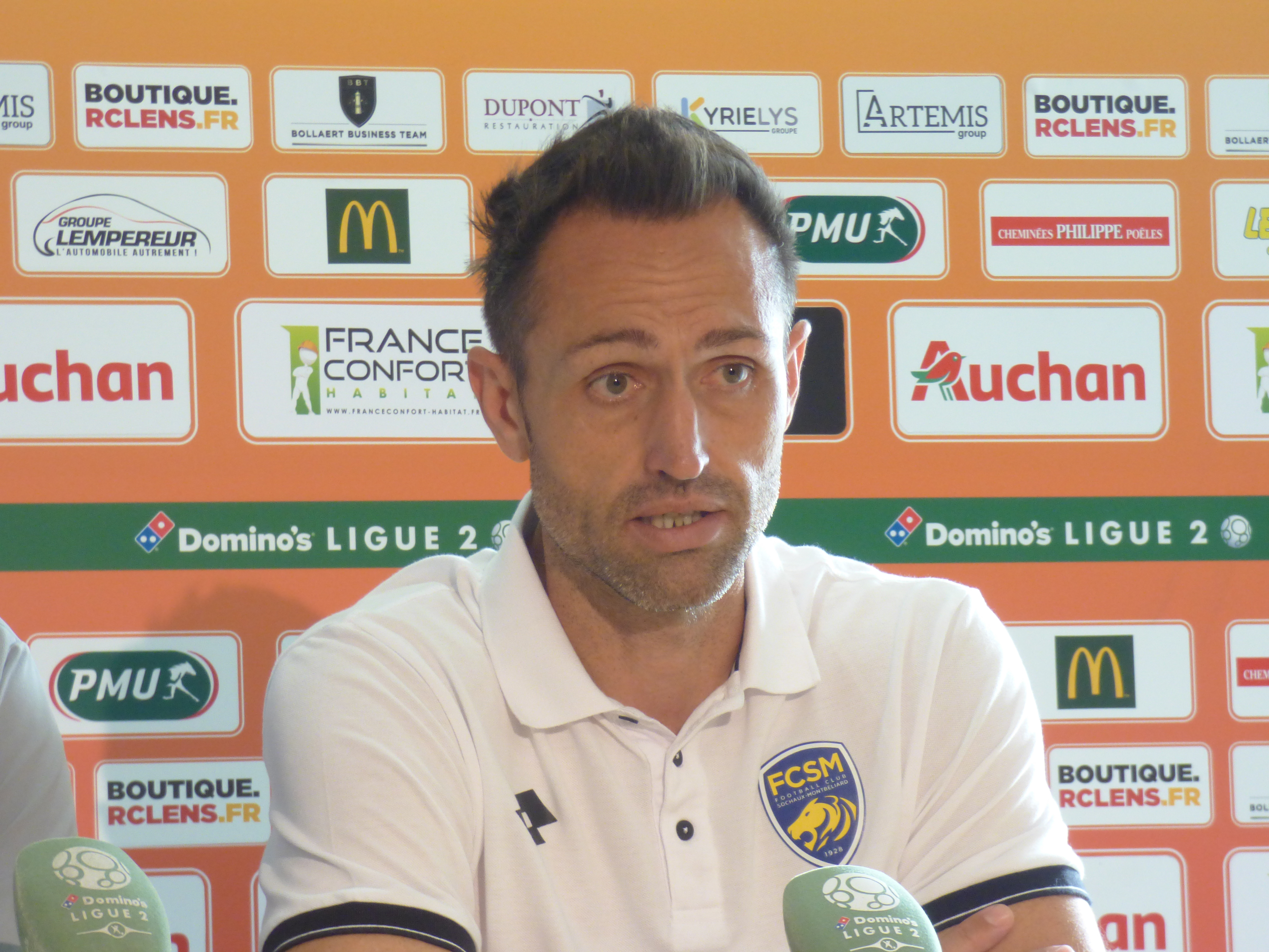 José Manuel Aira après le match Lens / Sochaux, comptant pour la septième journée du championnat de France de football de Ligue 2, le 15 septembre 2018.